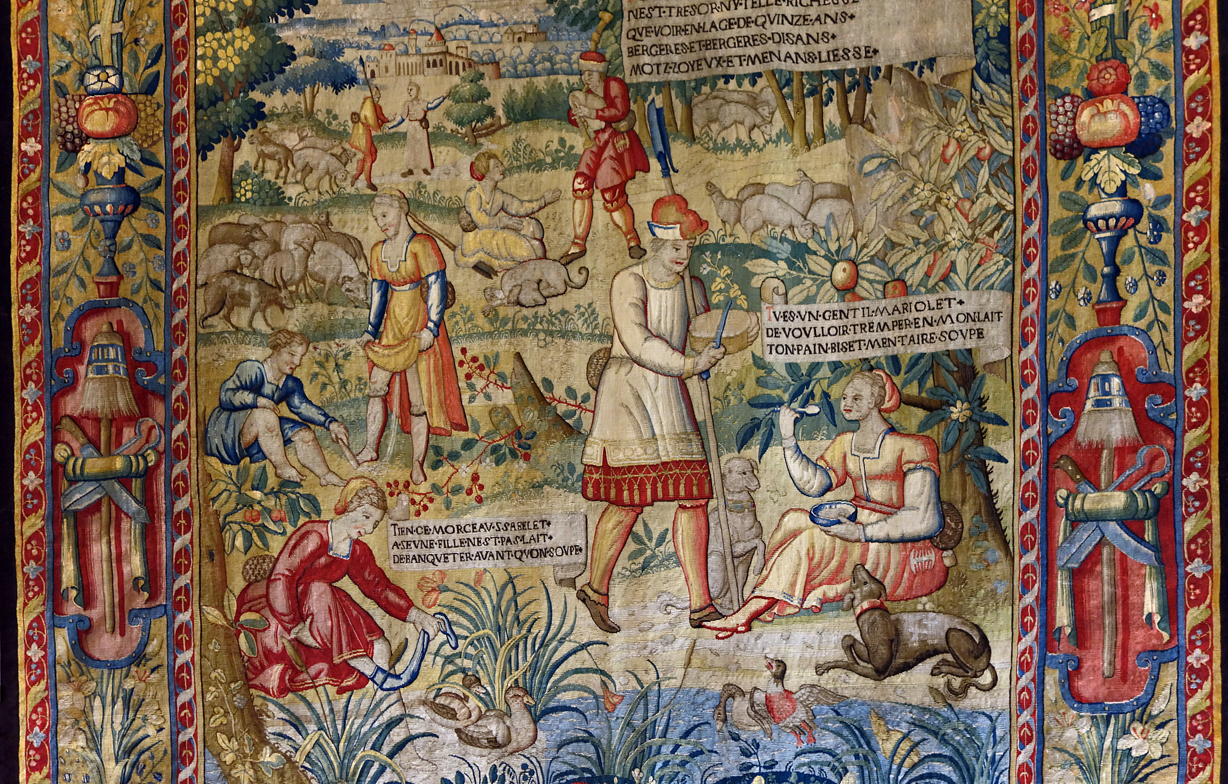 Tenture des Amours de Gombault et Macée, musée de Saint-Lô, tapisserie de Bruges, années 1590.